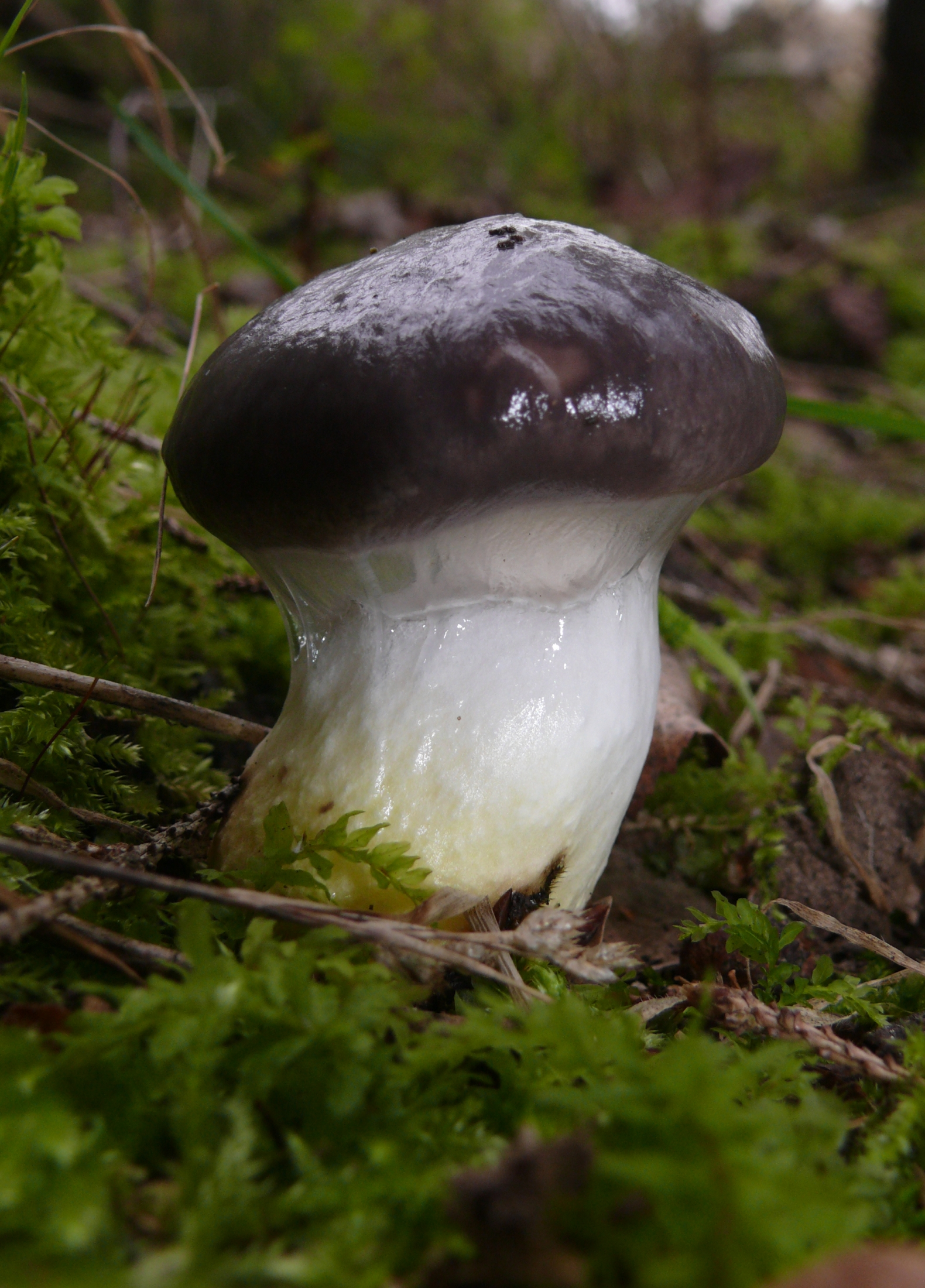 Gomphidius glutinosus, Schwäbisch-Fränkische Waldberge, Germany